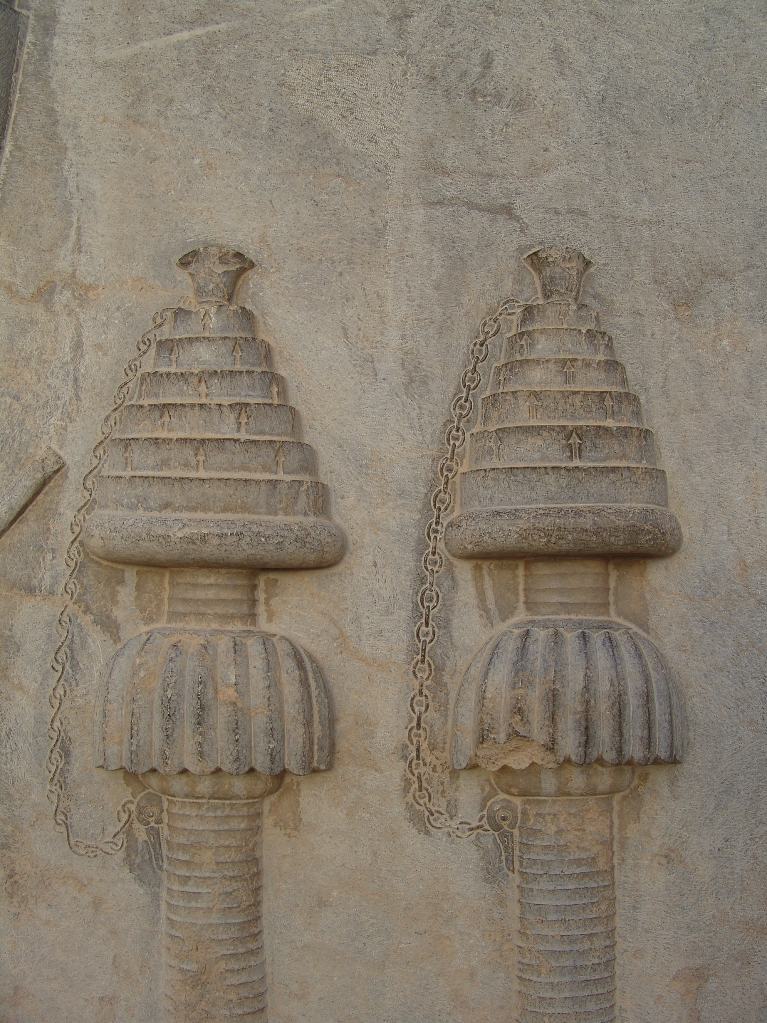 عودسوز در حجاری بار عام داریوش